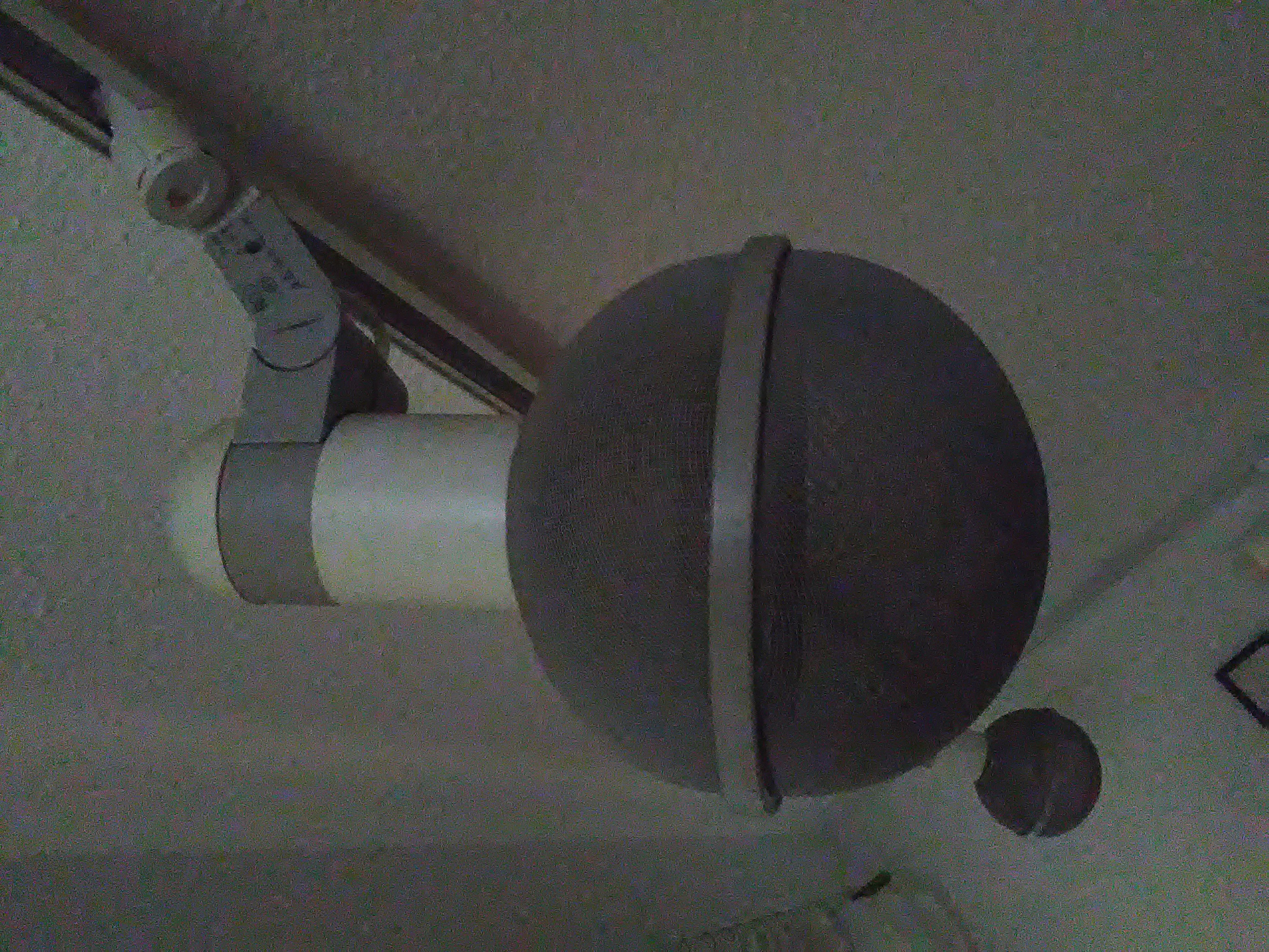 Bild zum Beitrag Leuchten designed von Roger Tallon